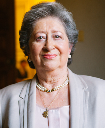 Olga Feliú, abogada chilena.